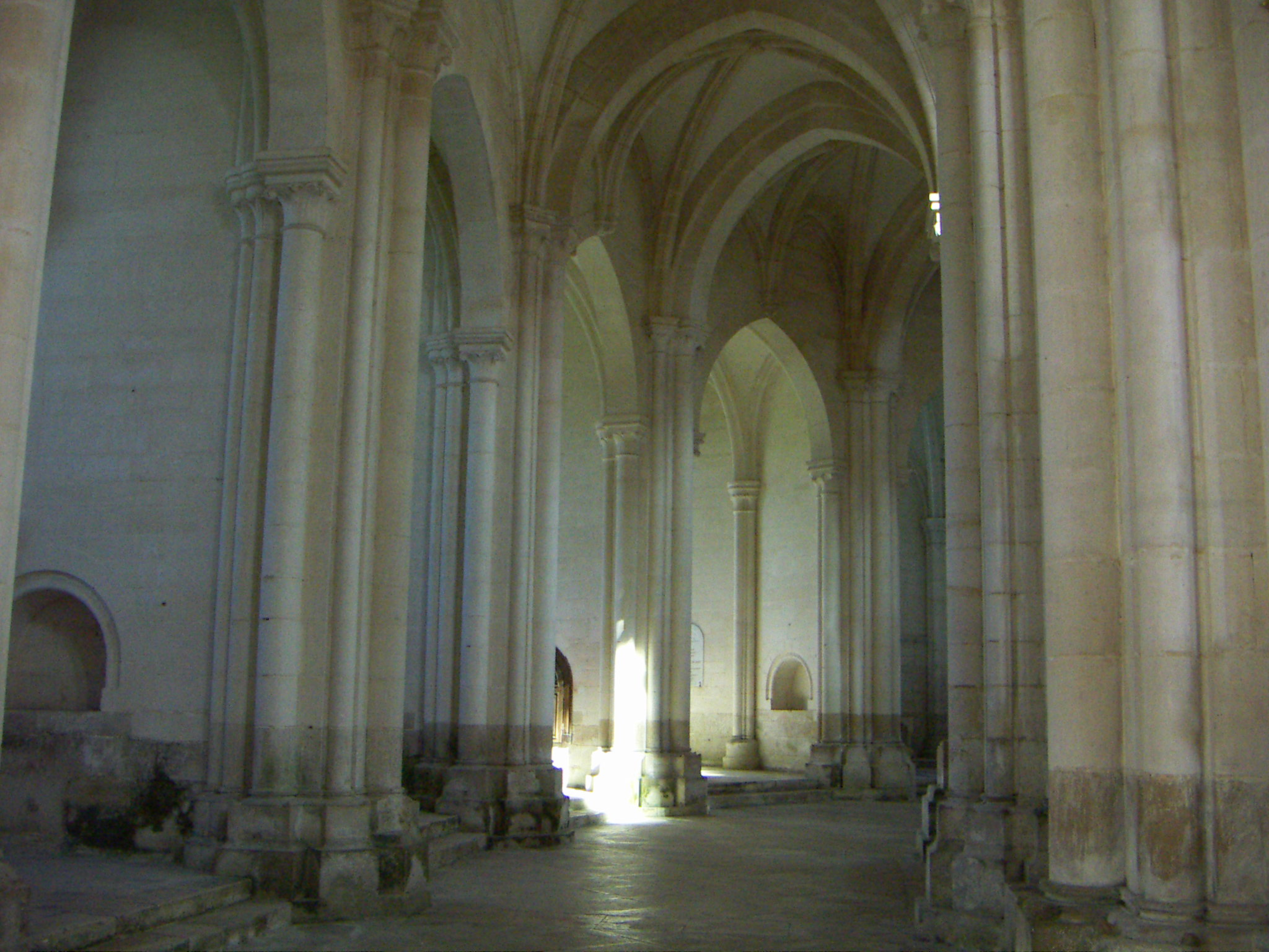 Pontigny Abbey, Chorumgang